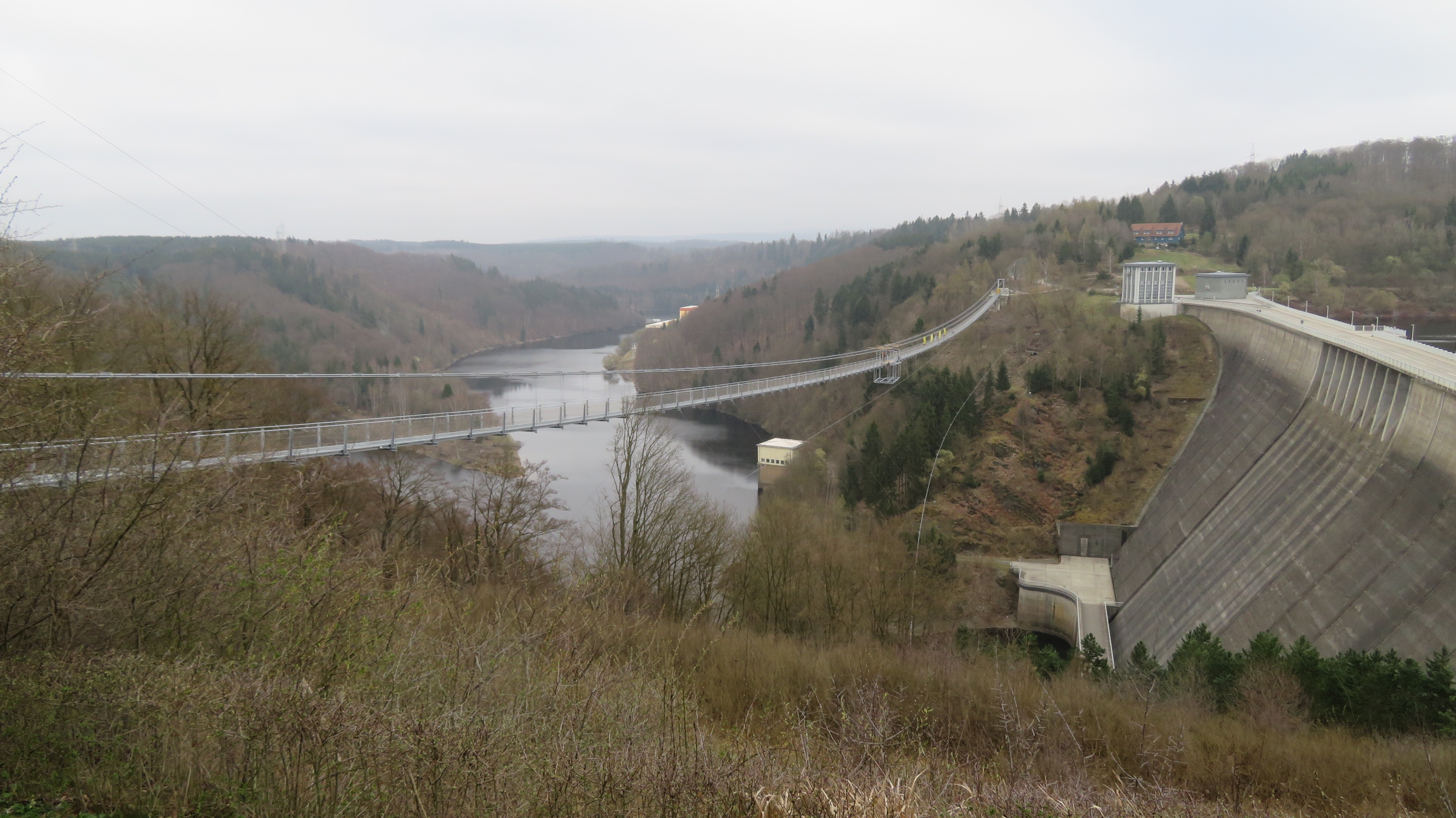 Hängeseilbrücke Rappbodetal von Westen aus gesehen